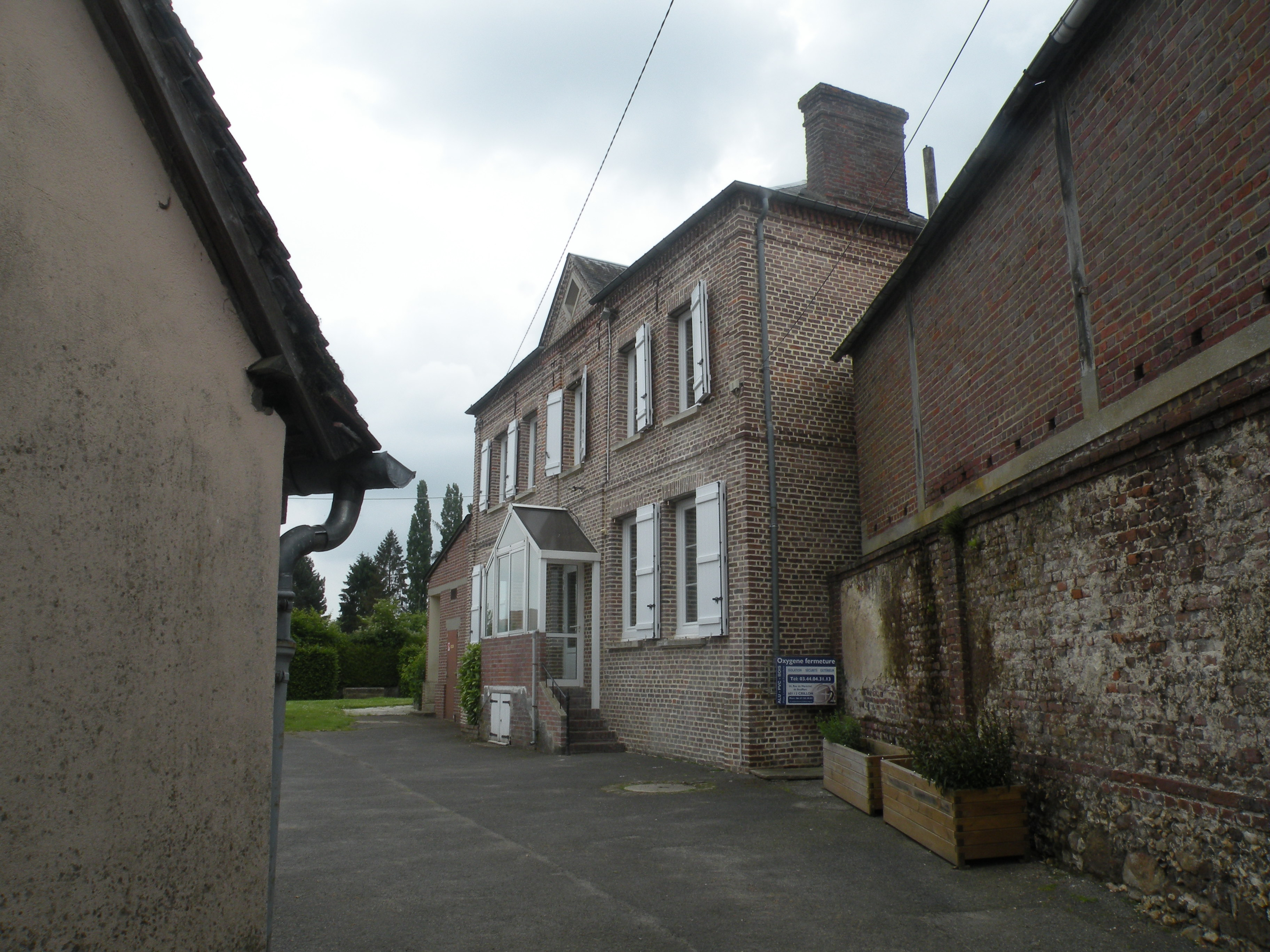 La Neuville-Vault mairie